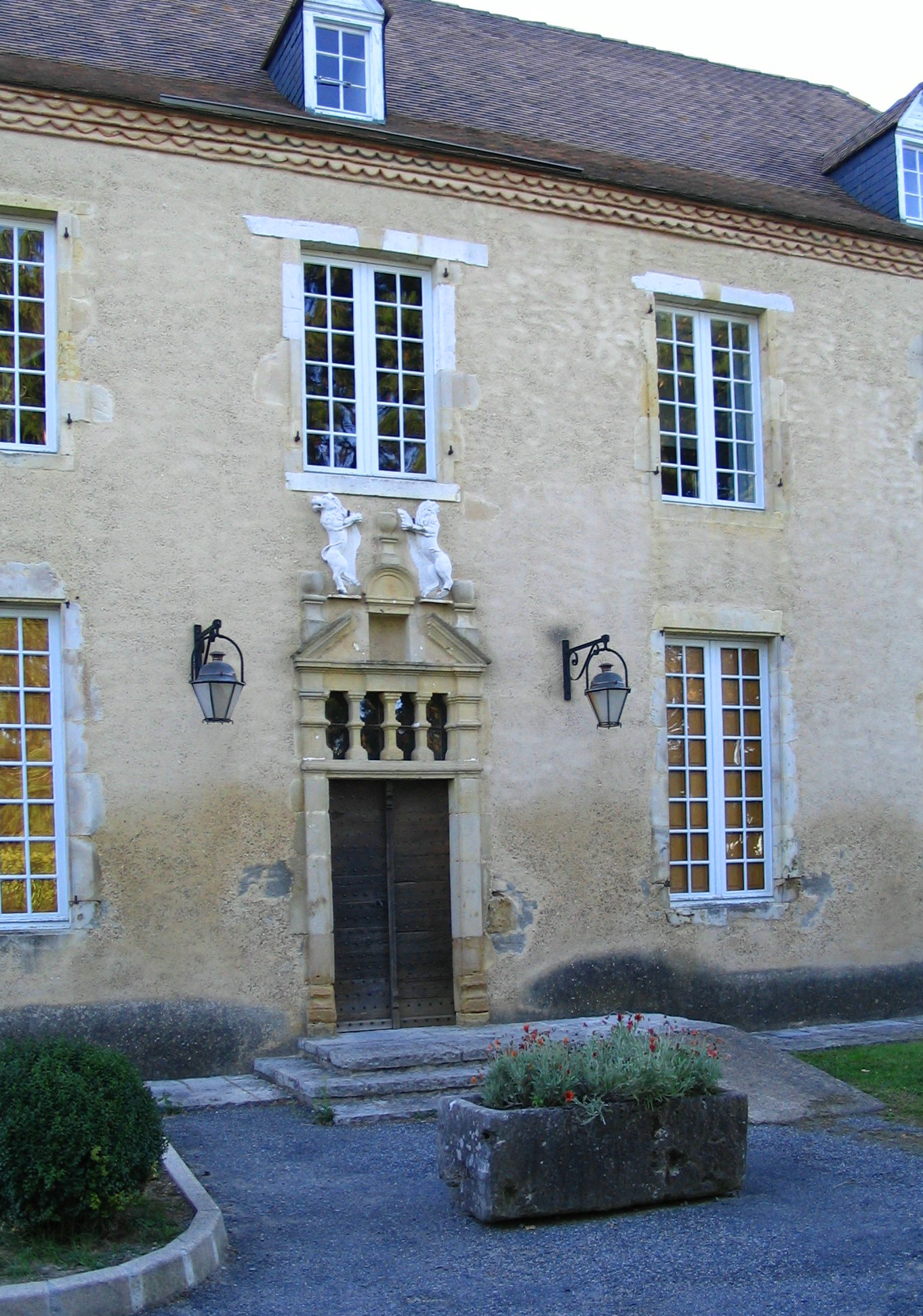 Thèze - Pyrénées Atlantiques - France Gentilhommière auteur: P.Charpiat - 2006